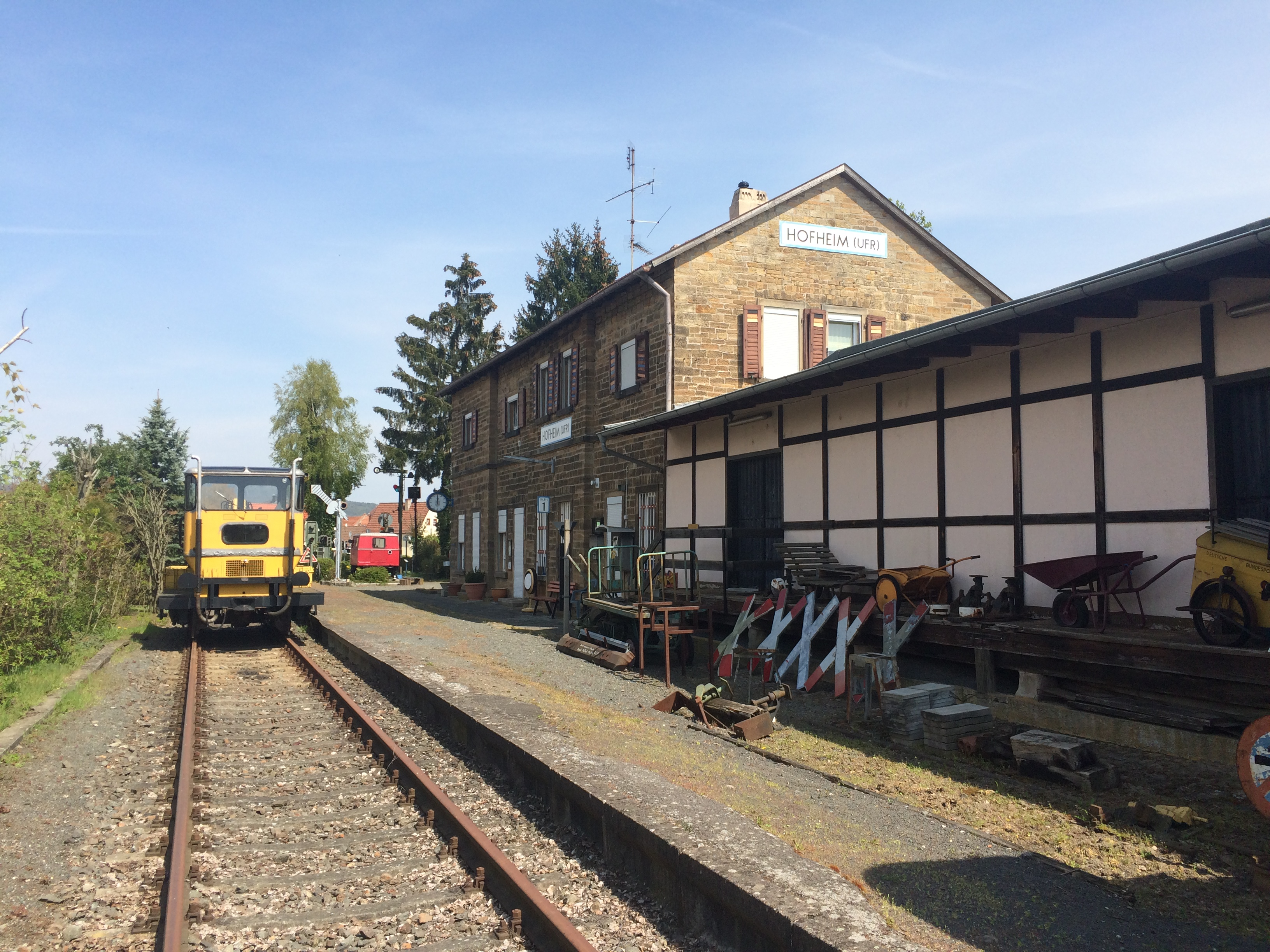 Hofheim (Unterfranken), ehemaliges Bahnhofsgebäude, heute Museum